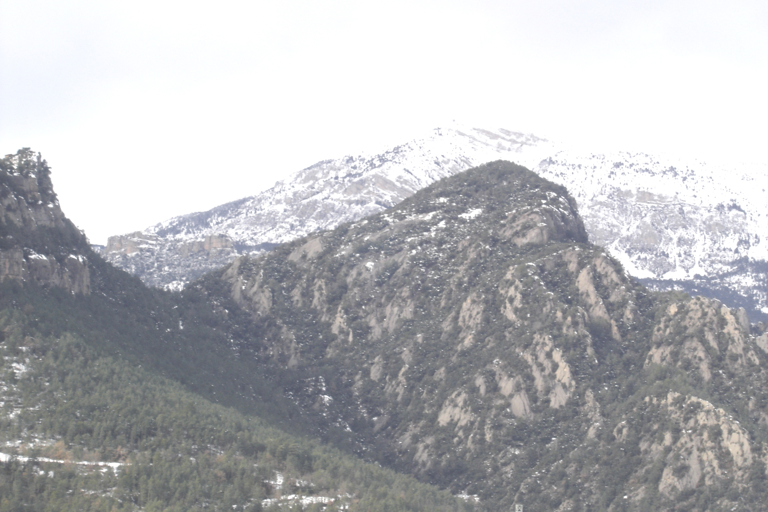 El vessant sud-oriental del Tossal de Vall-llonga, a la Vall de Lord (Solsonès)